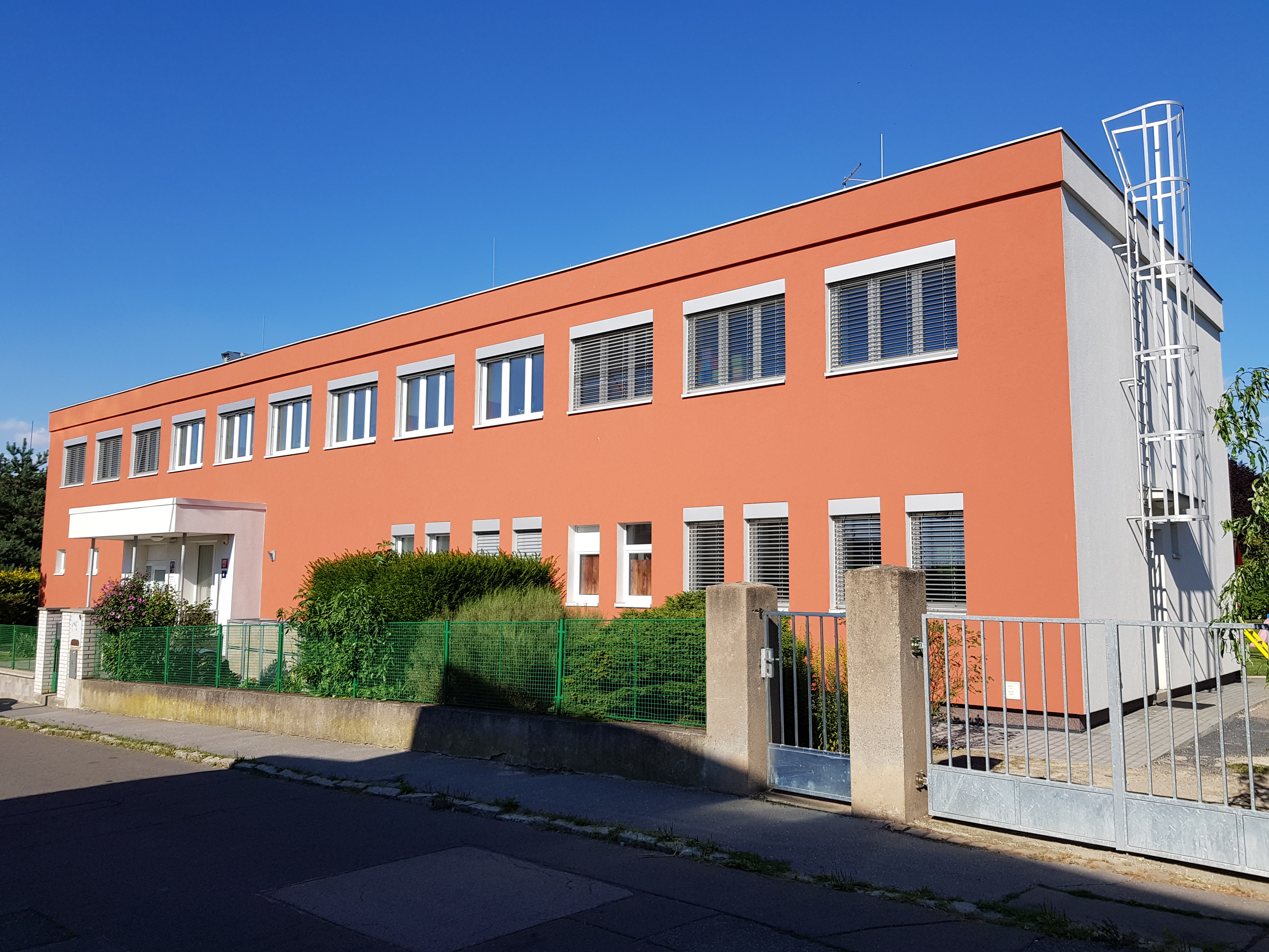 Mateřská škola Štolmířská, ulice Štolmířská 602/4, Praha 14-Hloubětín